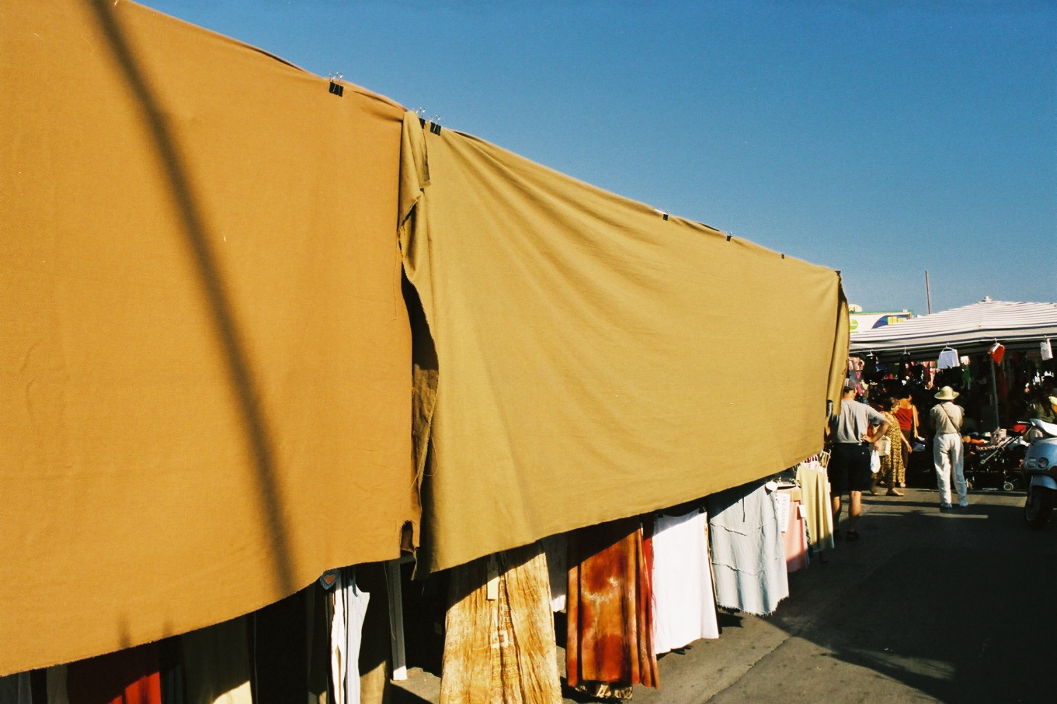 Nilson Menezes